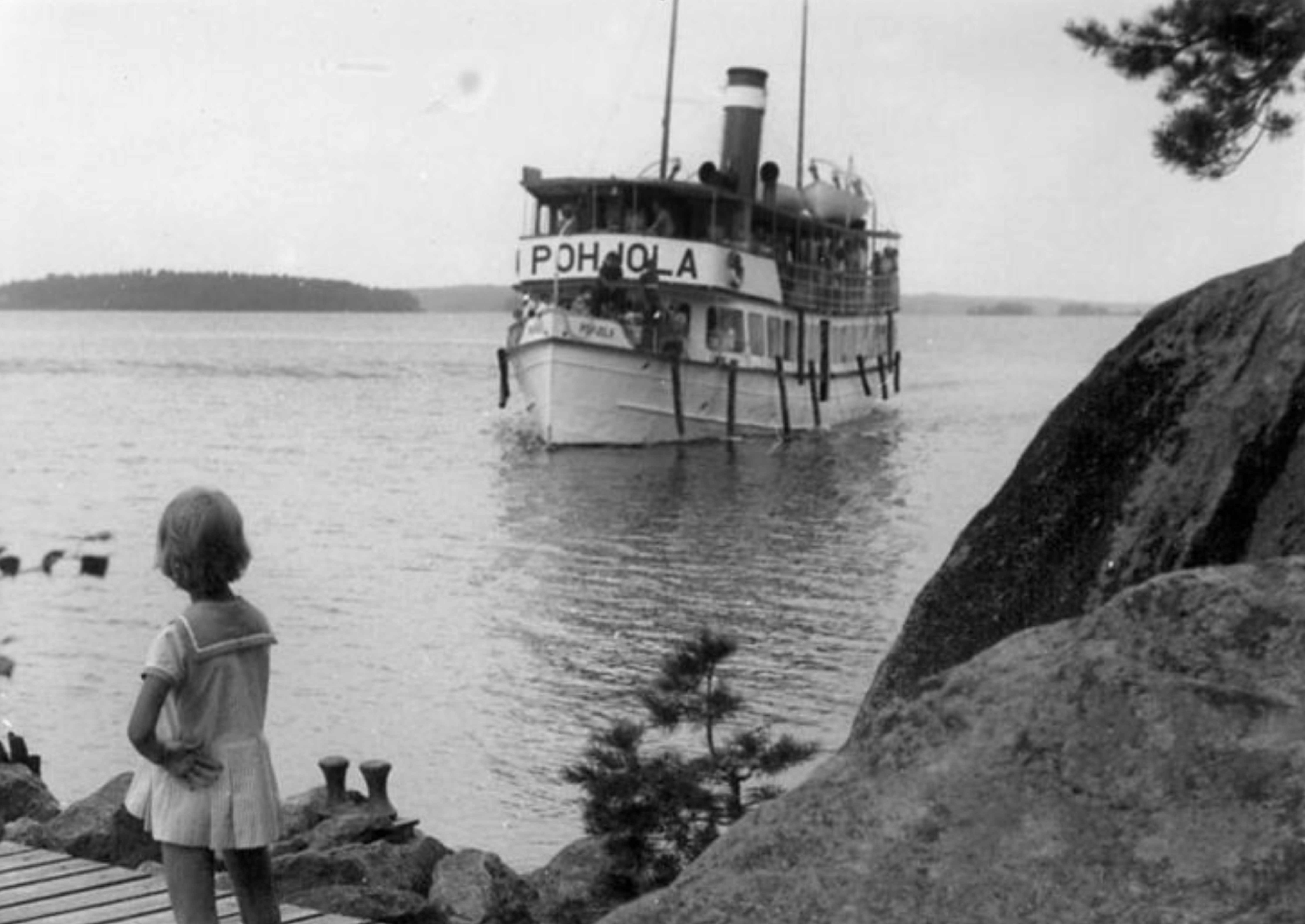 Höyrylaiva Pohjola rakennettiin Tampereella vuonna 1905. Se liikennöi Runoilijan tiellä, eli Tampereelta Ruovedelle, Virroille ja takaisin